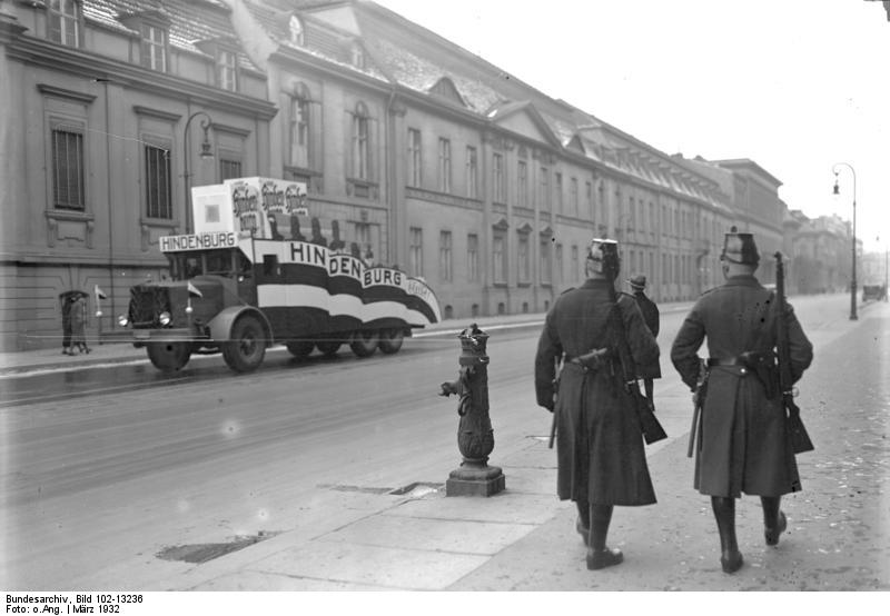 Wahlpropaganda am Tage der Reichspräsidentenwahl in den Strassen Berlins ! Schutzpolizei mit umgeschnallten Karabinern im Regierungsviertel sorgt für Ruhe und Ordnung während der Reichspräsidentenwahl. Im Hintergrund ein Propagandaauto.